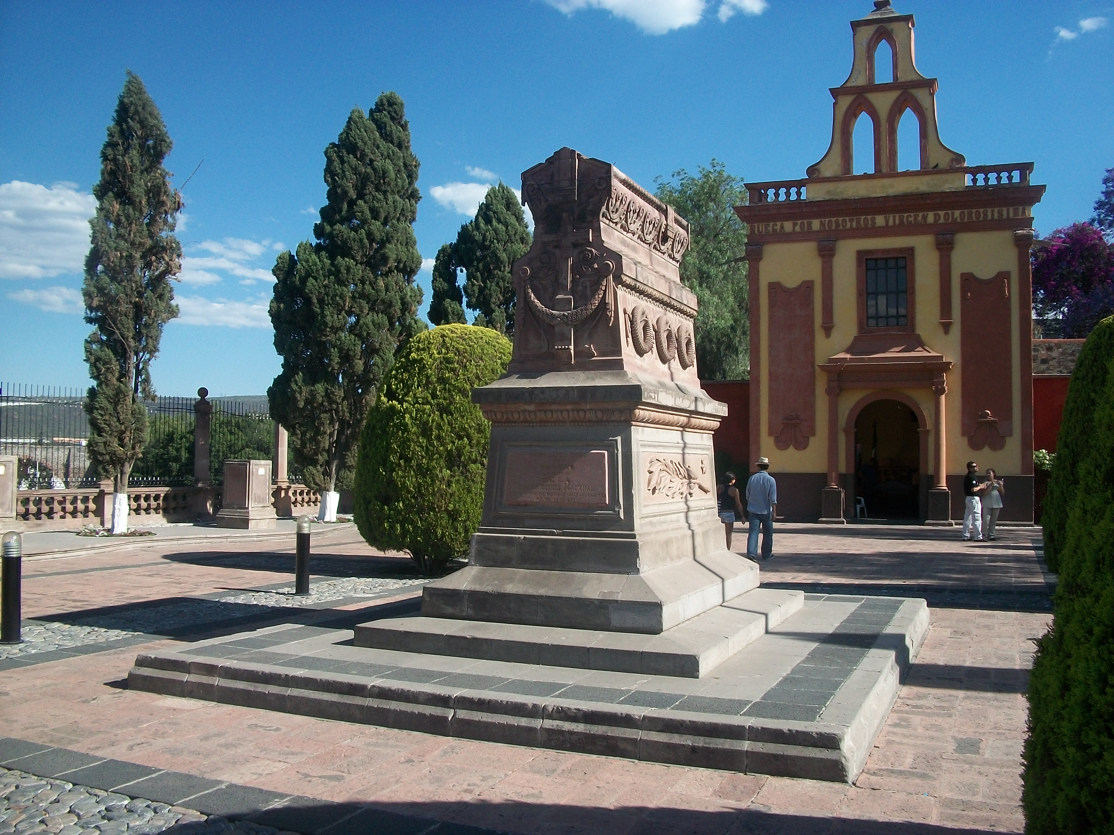 Sepulcro de los corregidores Josefa Ortiz y Miguel Domínguez en el Panteón de los Queretanos Ilustres, Santiago de Querétaro, México.